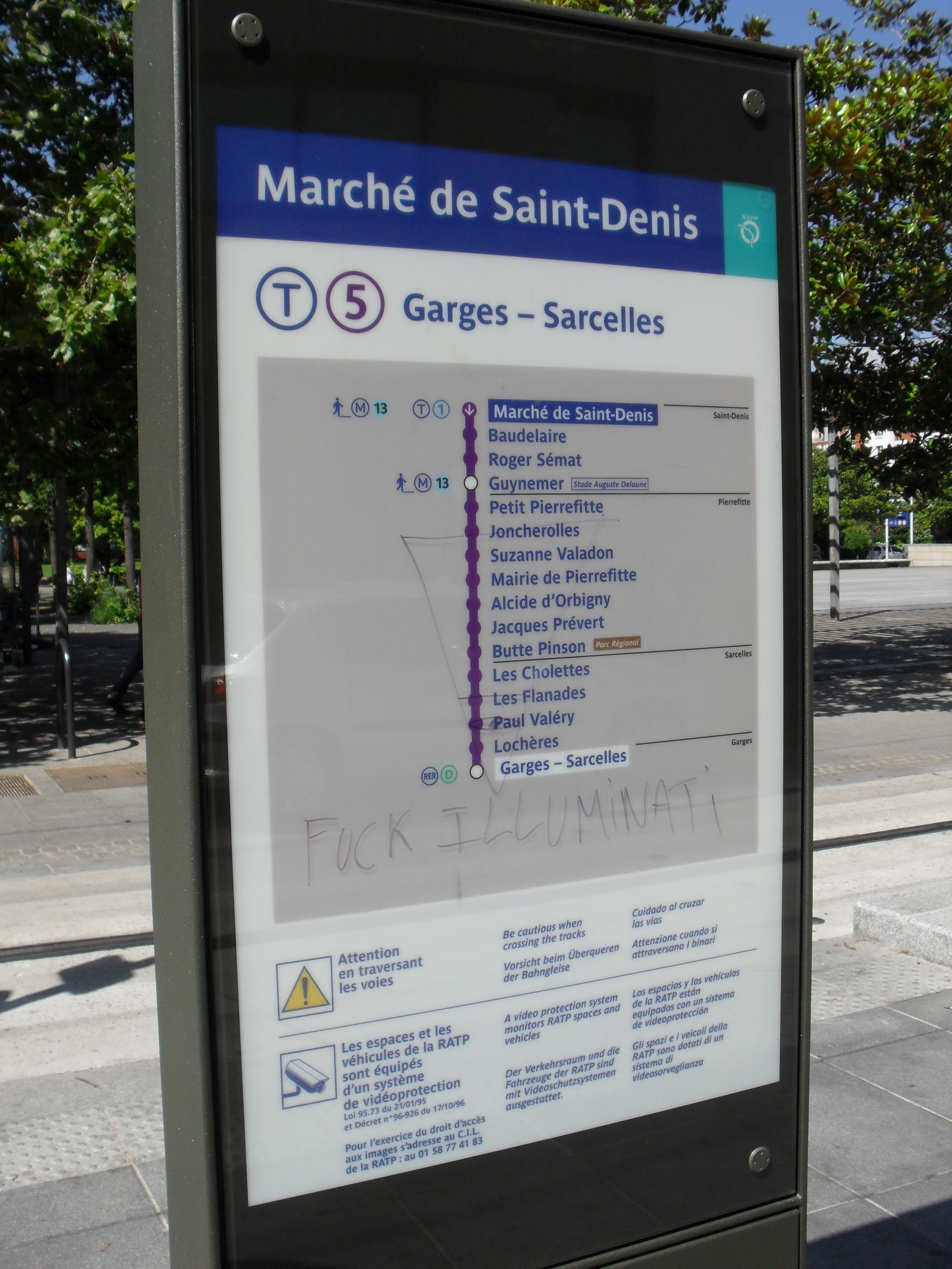 La station T5 "Marché de Saint-Denis".